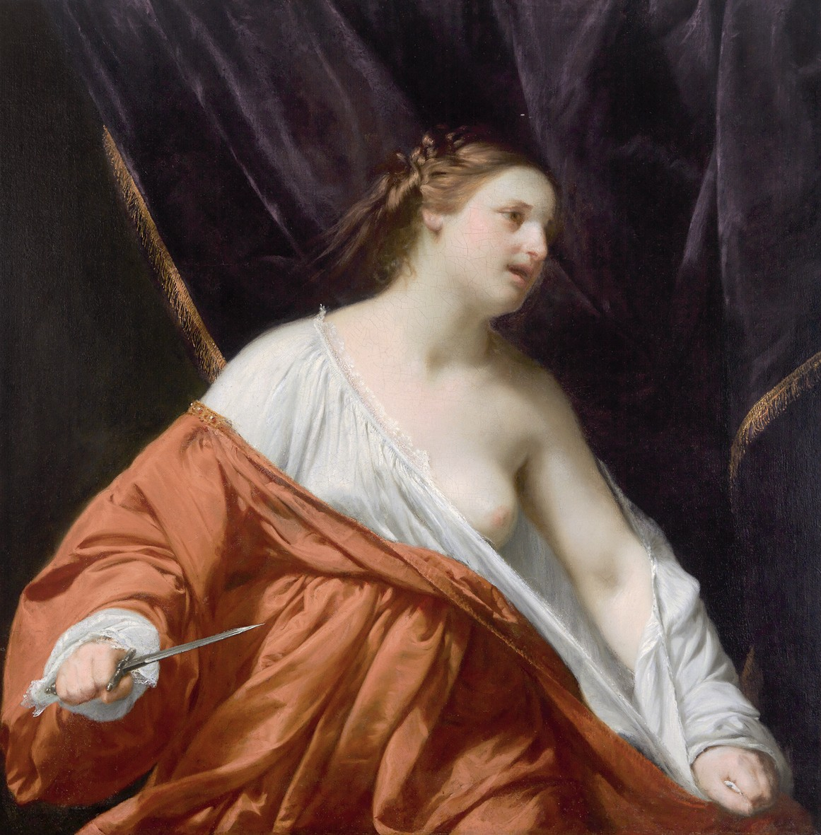 La Mort de Lucrèce.title QS:P1476,fr:"La Mort de Lucrèce." label QS:Lfr,"La Mort de Lucrèce." label QS:Lde,"der Tod der Lucrezia"